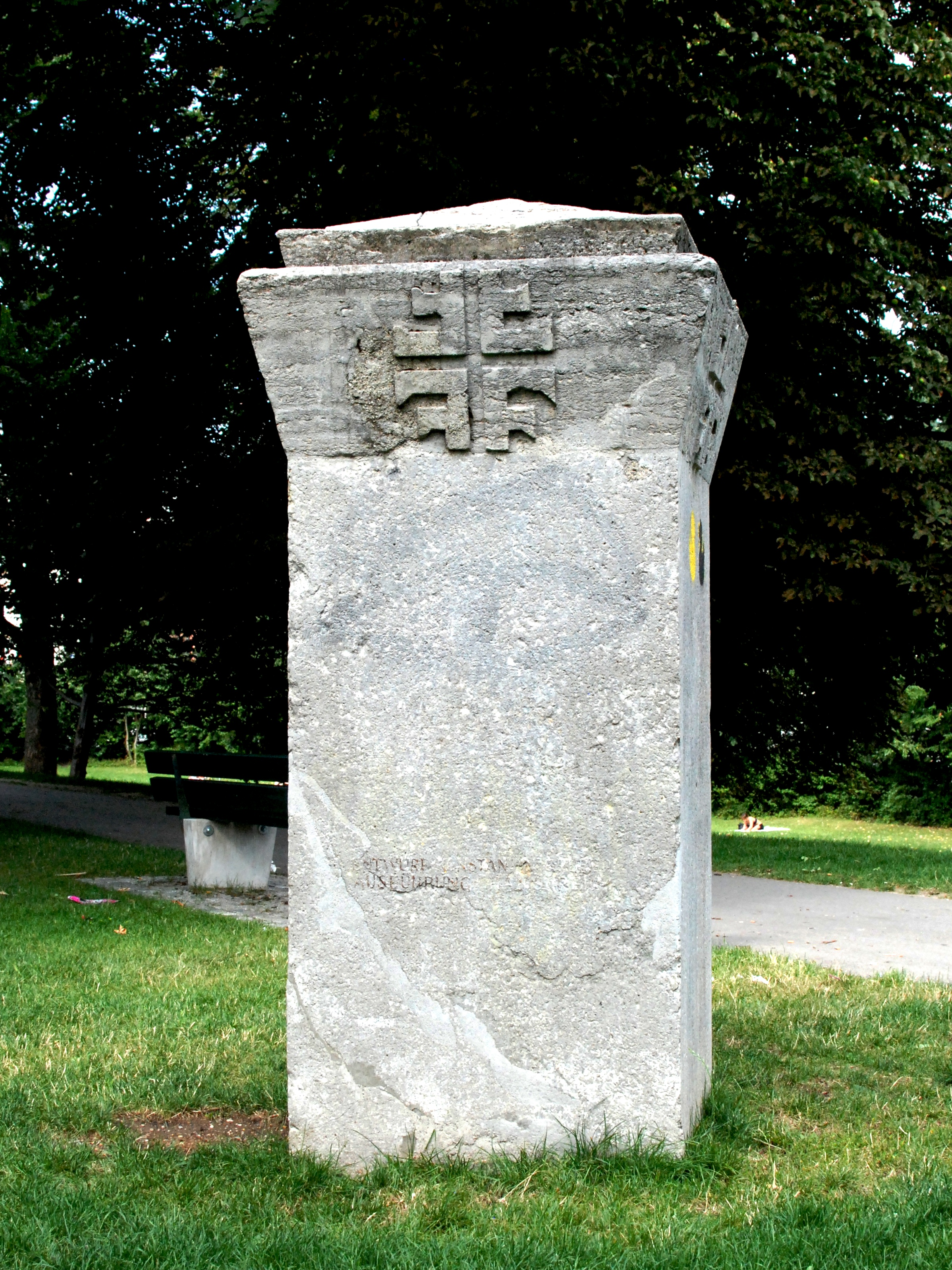 Gedenkstein für Hans Ferdinand Maßmann im Maßmannpark an der Maßmannstraße in München, Regierungsbezirk Oberbayern, Bayern.